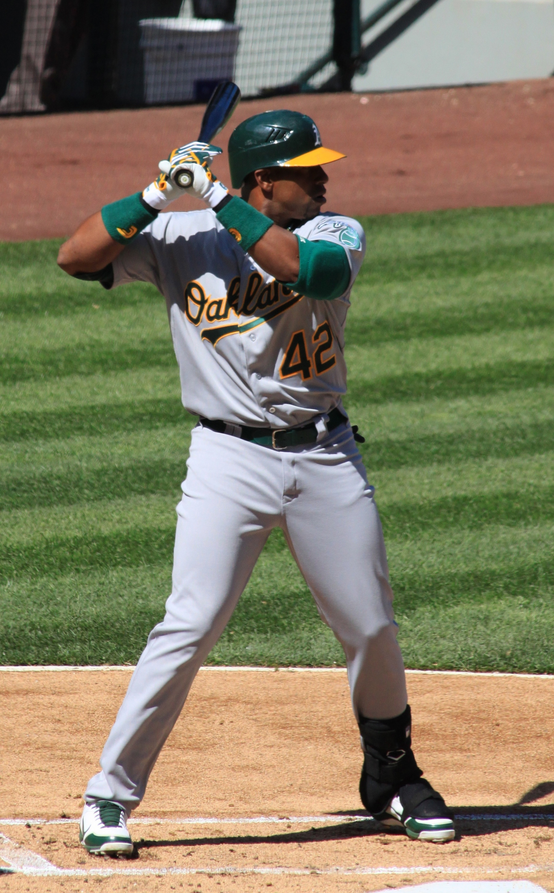 Yoenis Céspedes